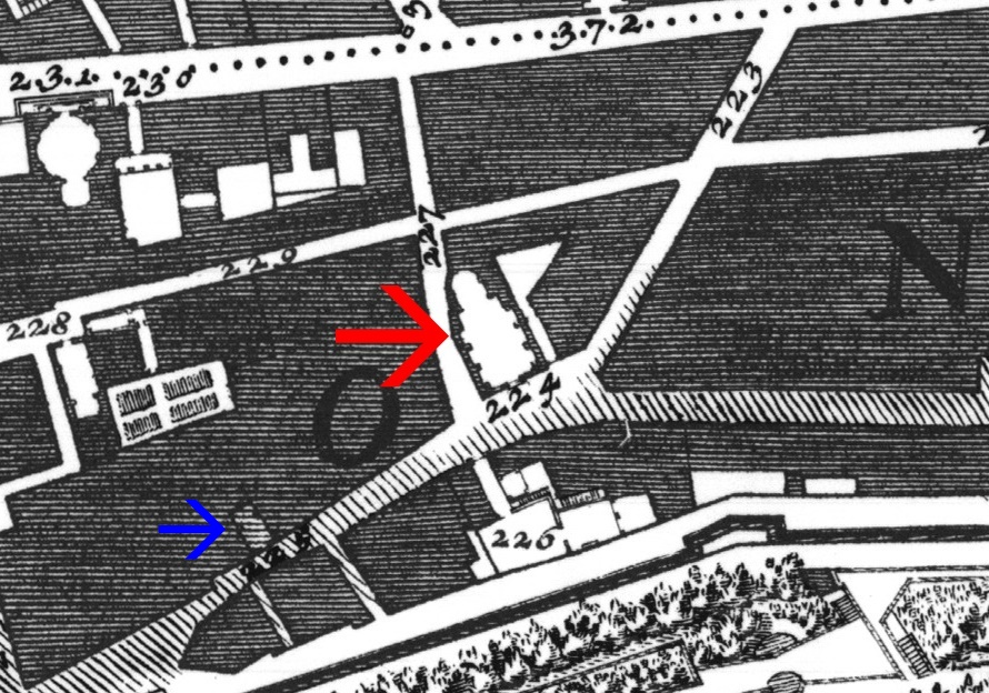 Pianta di Nolli